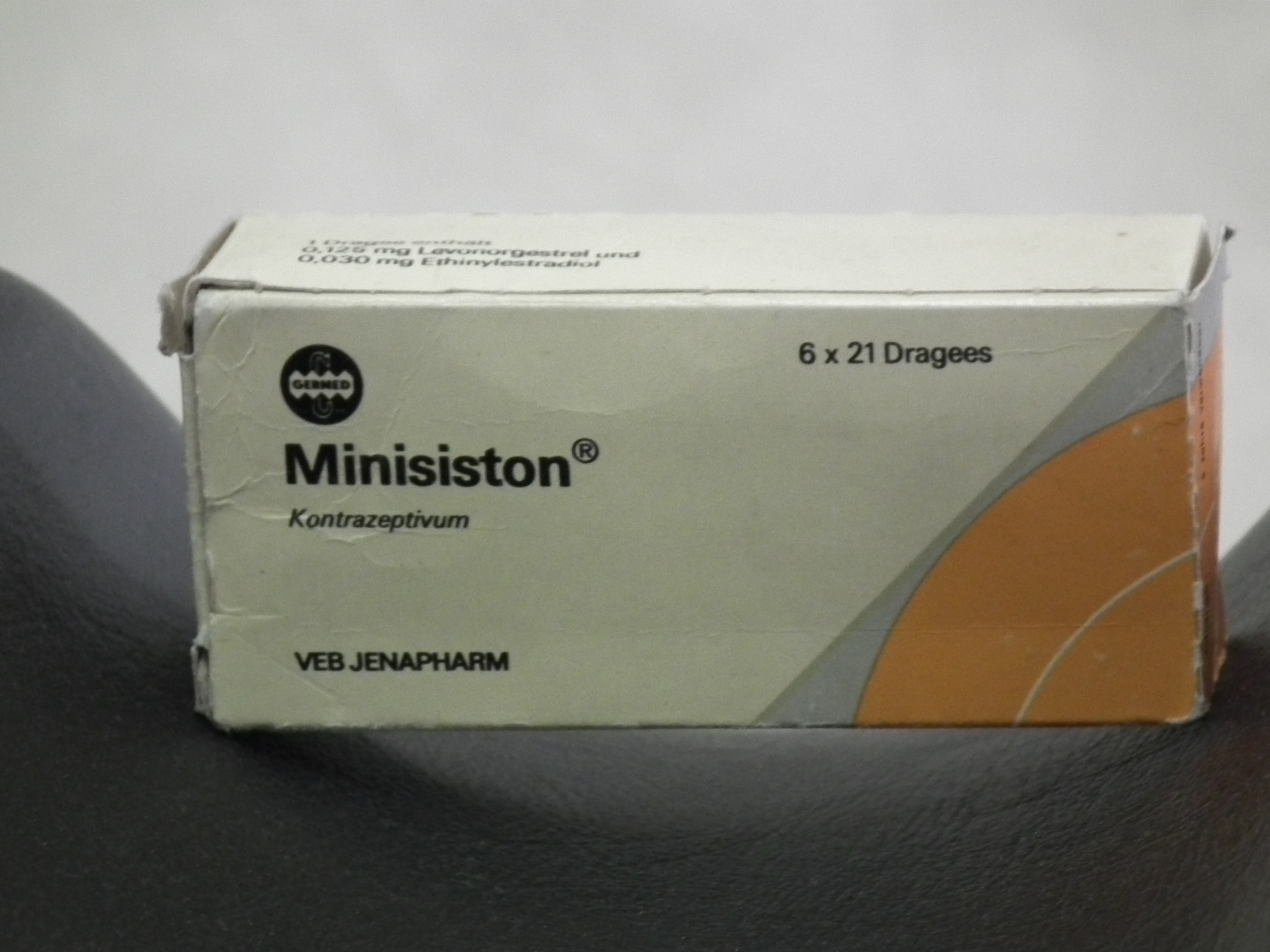 DDR Museum Zeitreise Radebeul, Minisiston VEB Jenapharm, Fotografiert mit Genehmigung der Museumsleitung